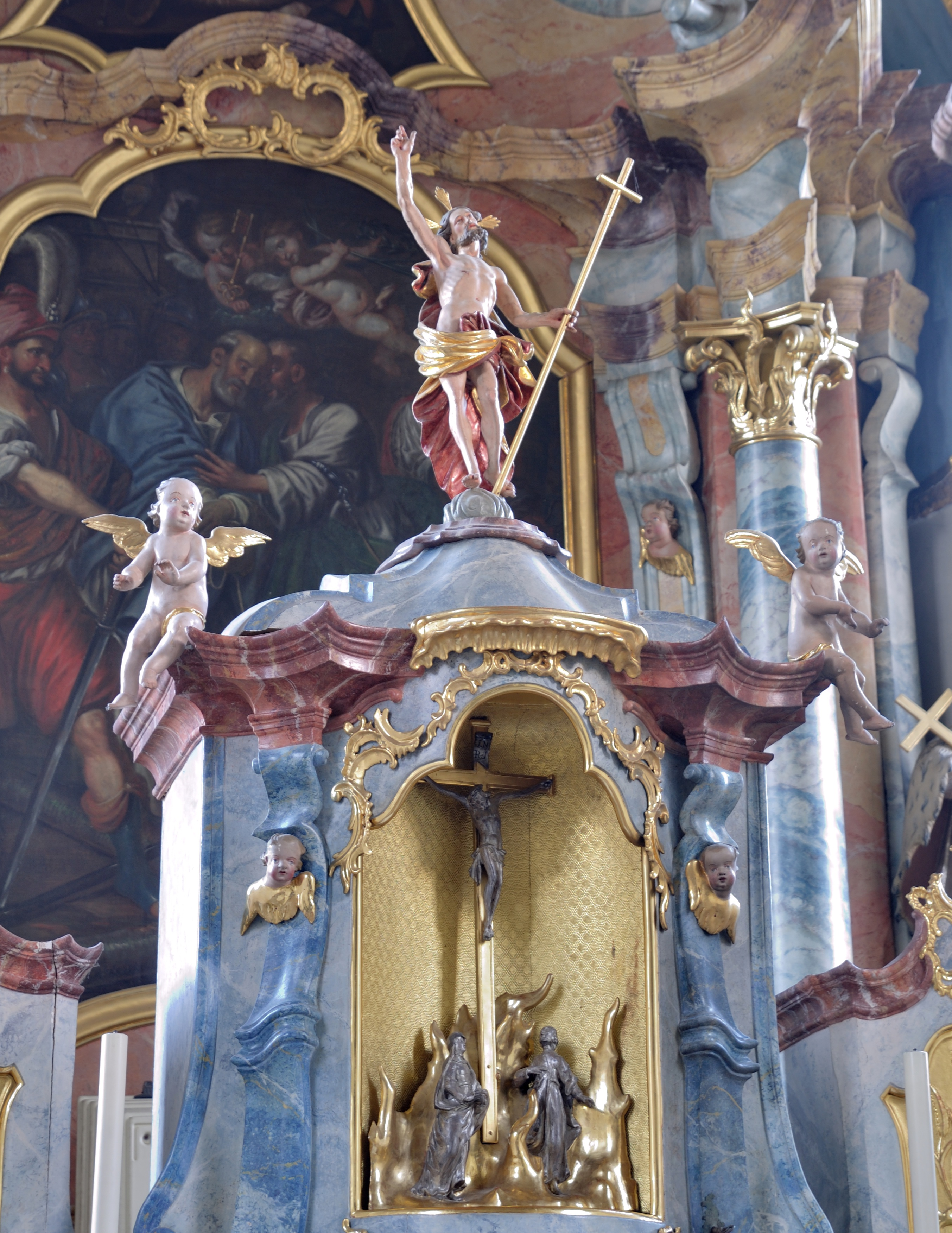 Rheinfelden-Minseln: Hochaltar (Auferstehungschristus)